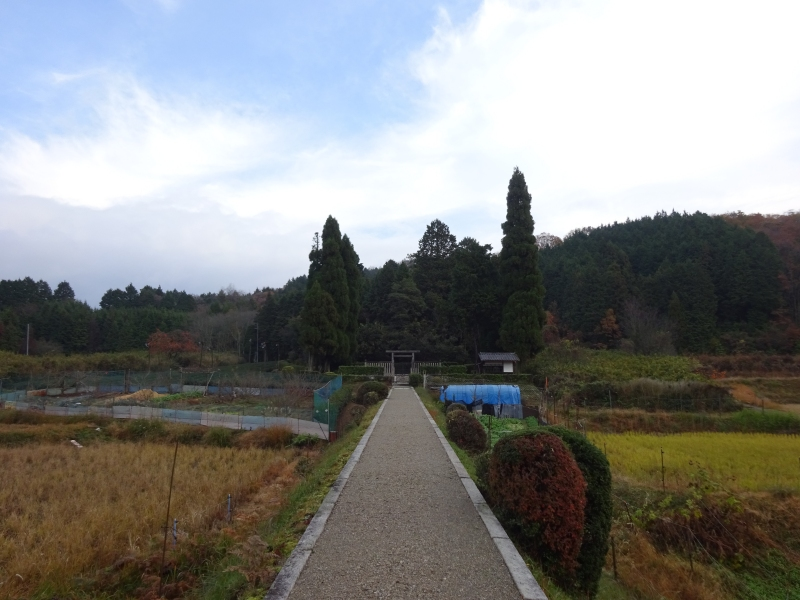 春日宮天皇陵